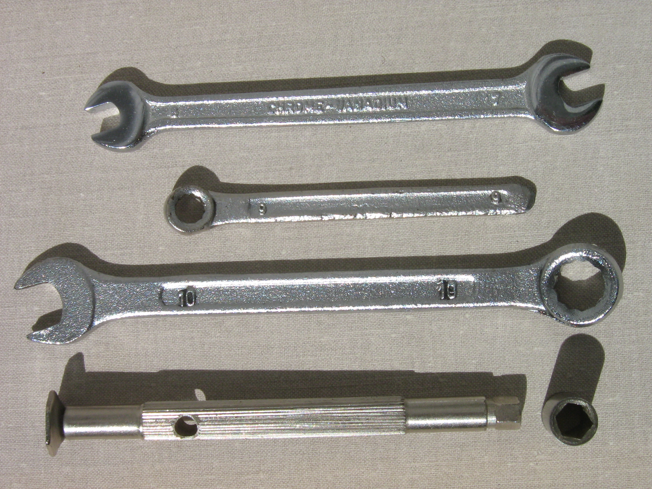 Различные виды гаечных ключей.